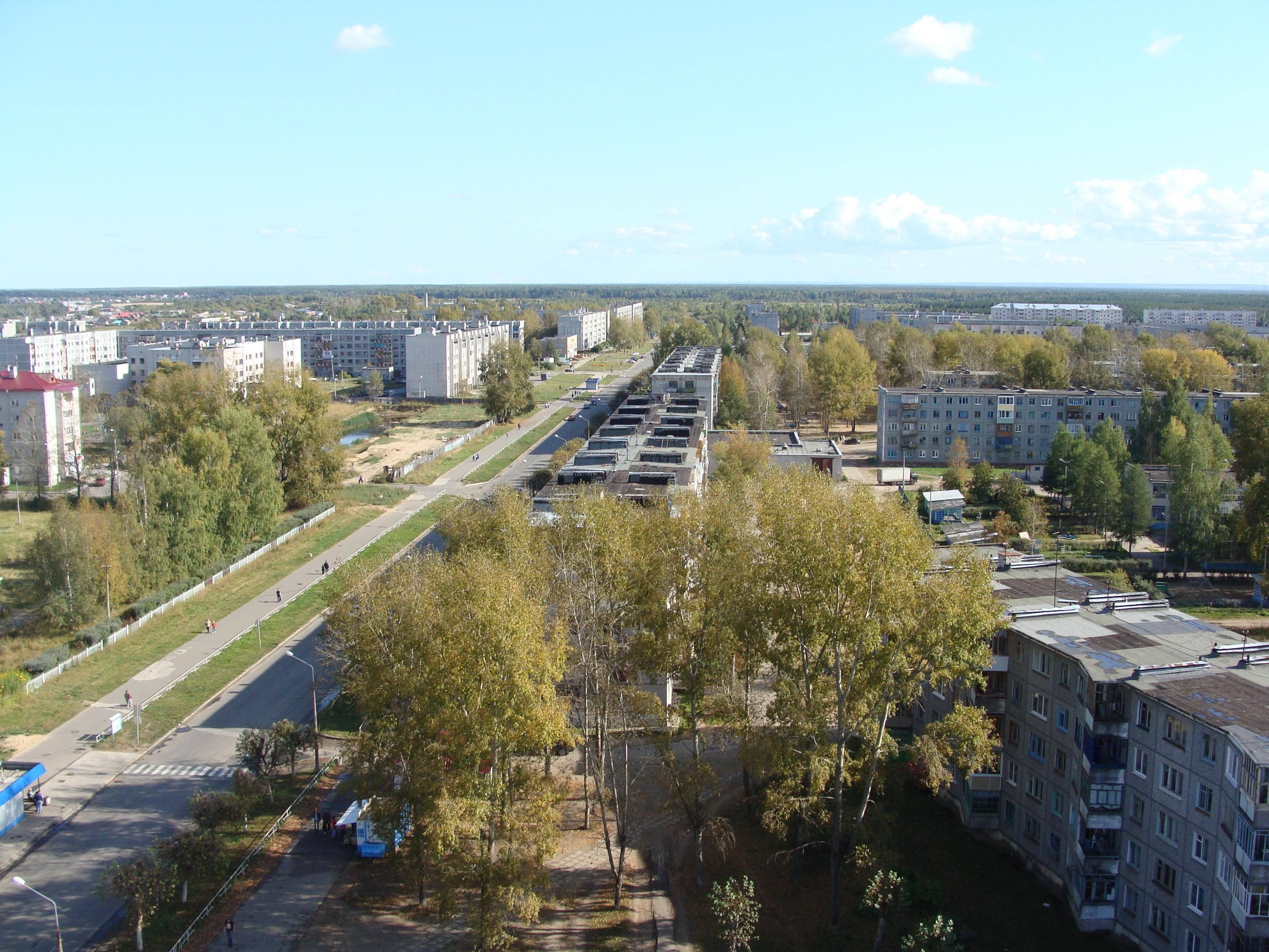 Проспект им. Ленина г.Коряжма